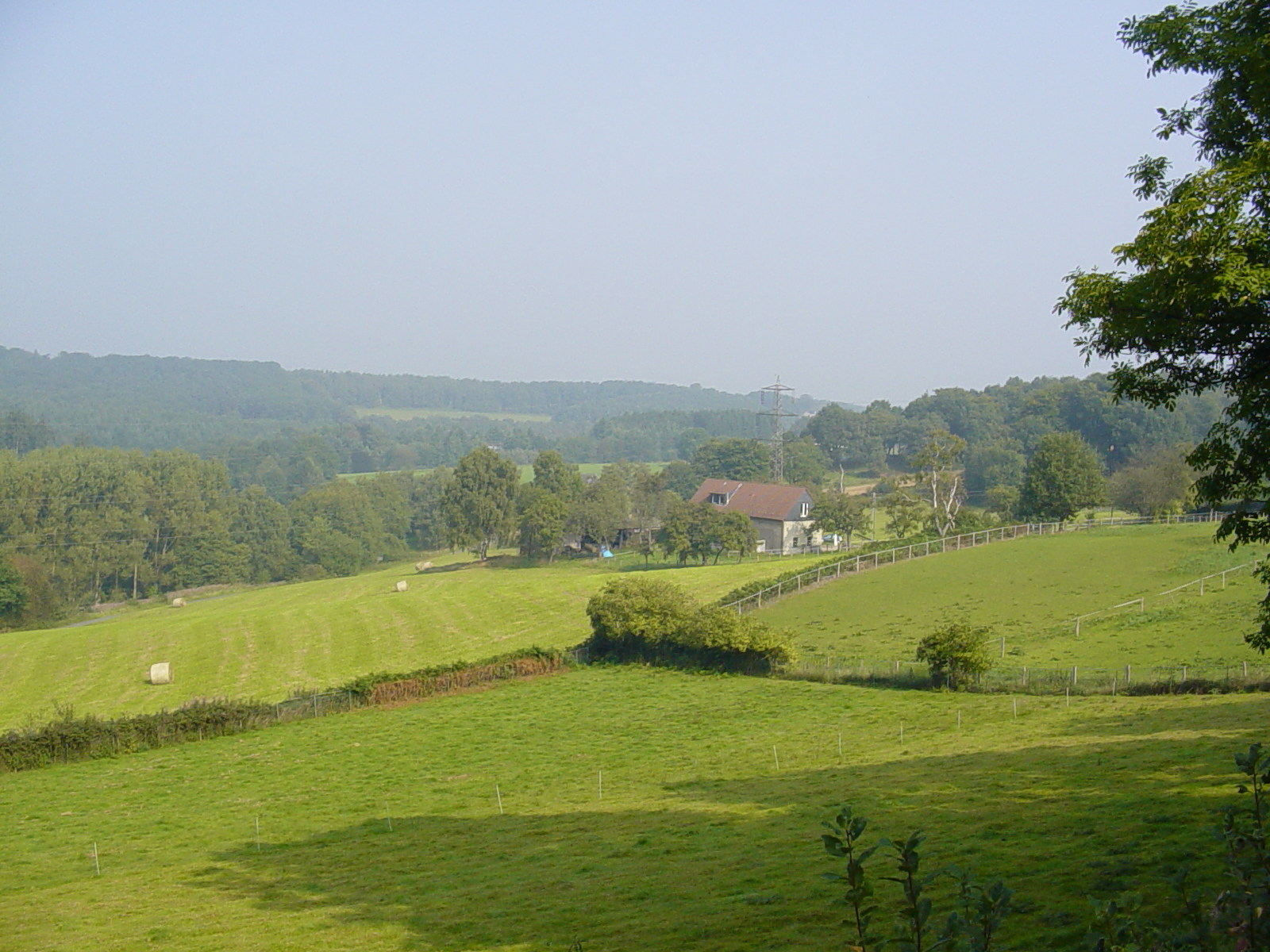 Blick über das Muttental